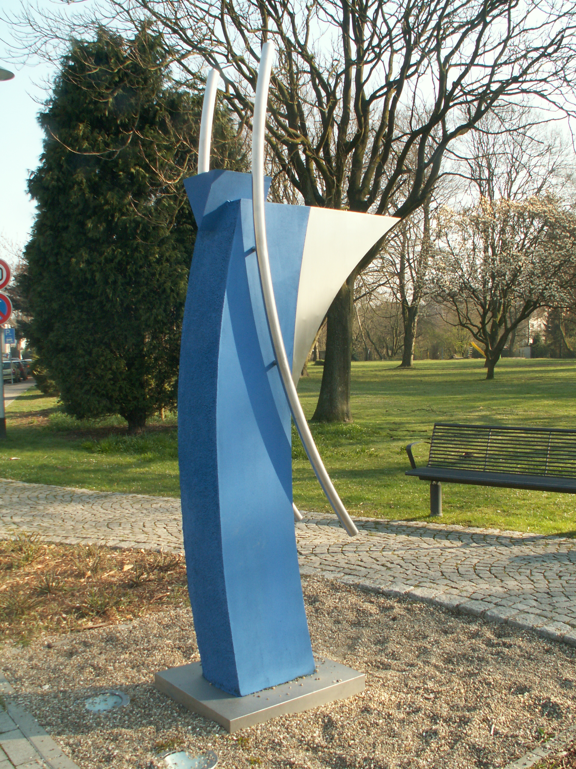 Haltern am See, Kunstwerk Kiep in der Nähe des Bahnhofs, wird als Kabarettpreis vergeben, Künstler ist Ulrich Schriewer